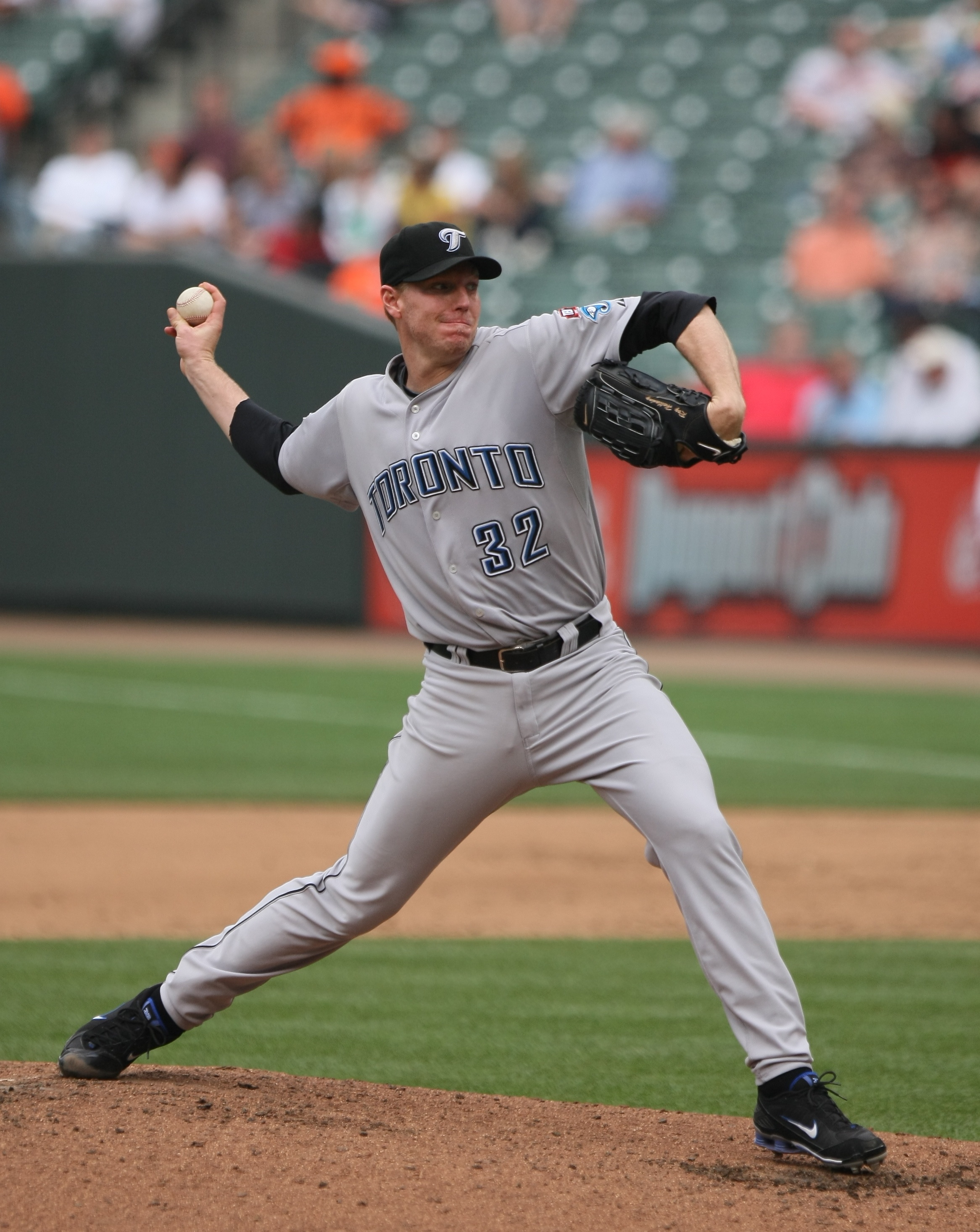 Roy "Doc" Halladay